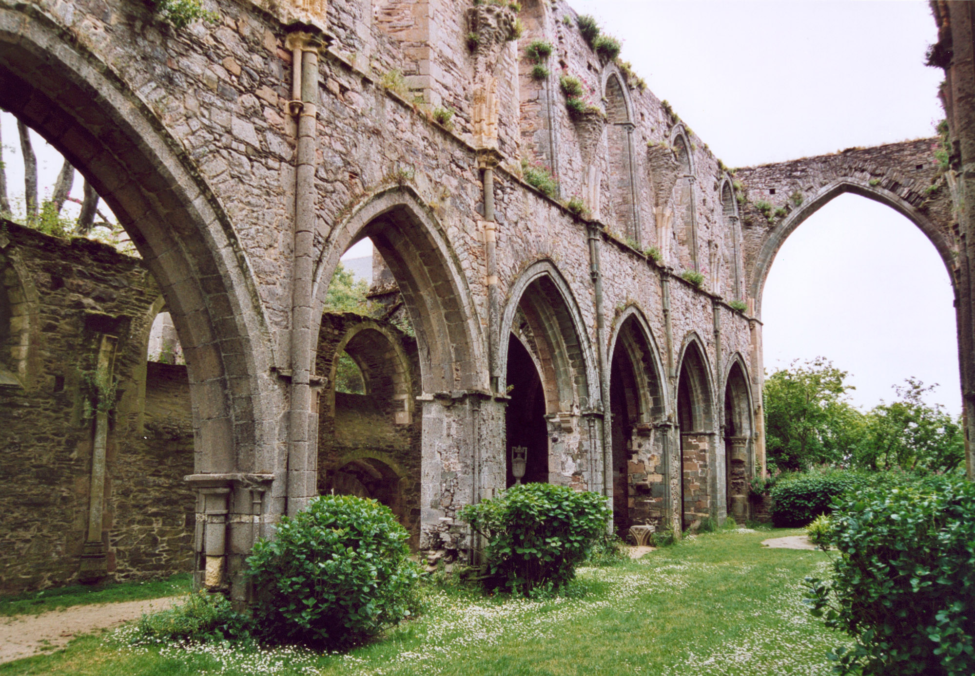 Bretagne Kérity Abbaye de Beauport Auteur : GIRAUD Patrick